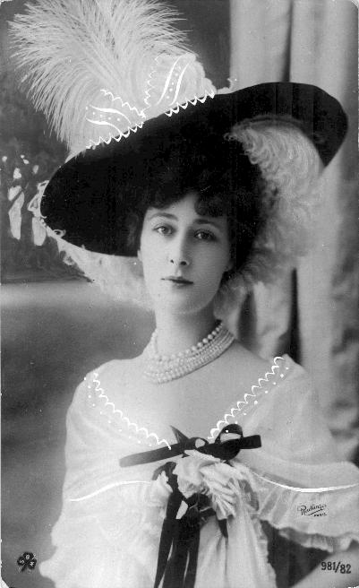 Liane de Pougy (1869-1950), franz. Tänzerin